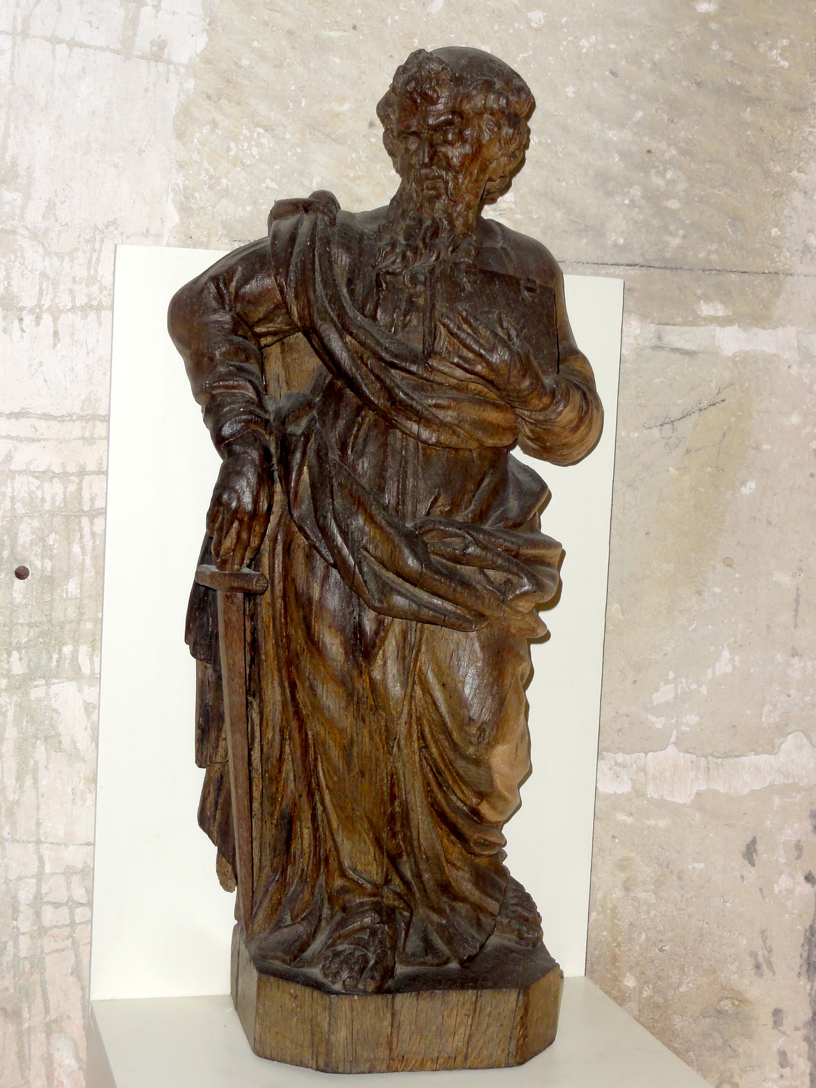 Statue de saint Paul, XVIIIe s.